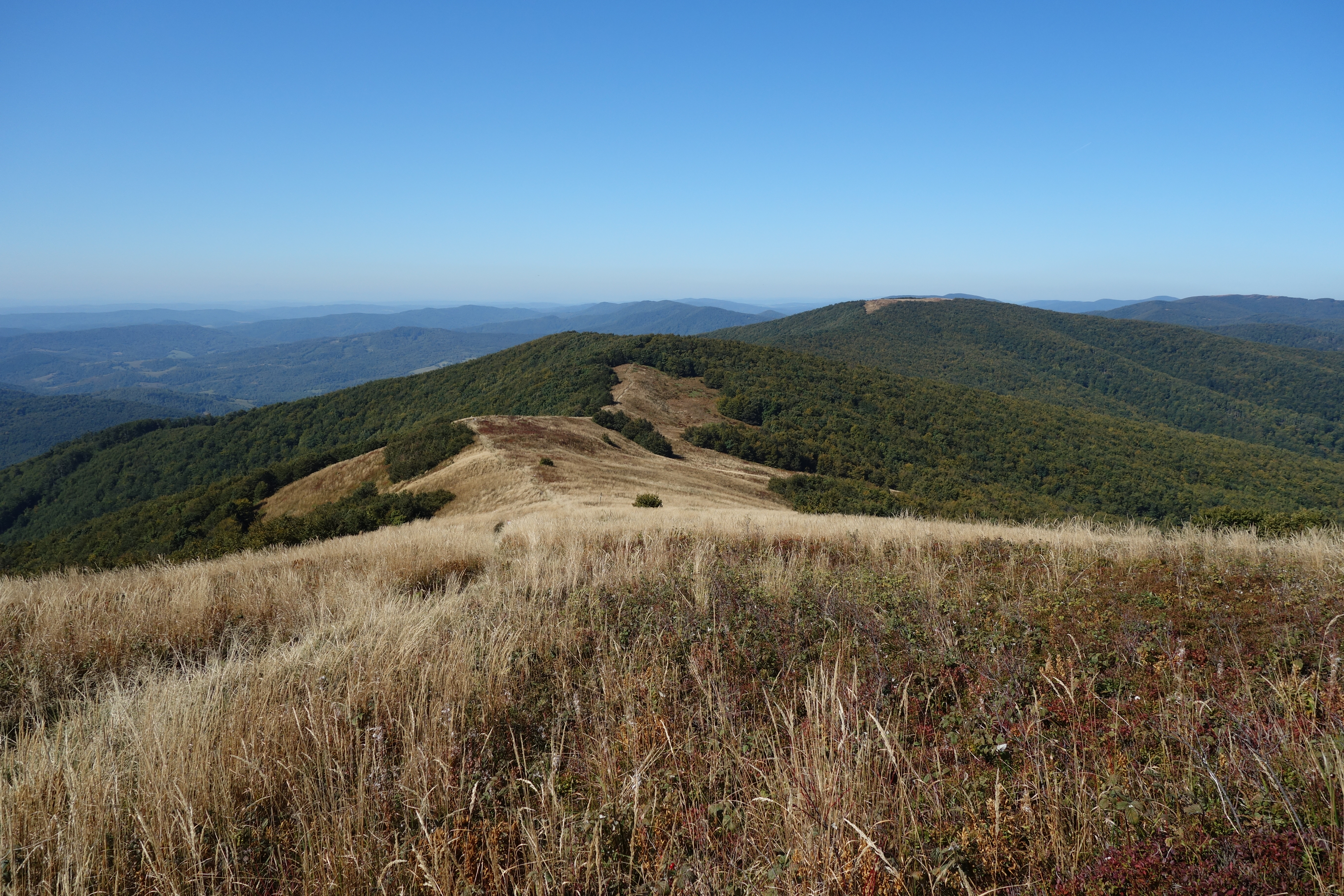 Výhľad z Ďurkovca smerom do Sedla pod Ďurkovcom a na Pľašu (vpravo) v Národnom parku Poloniny This is a photography of Natura 2000 protected area with ID SKUEV0229 This is a photography of Natura 2000 protected area with ID SKCHVU002 This is a photography of Natura 2000 protected area with ID PLC180001